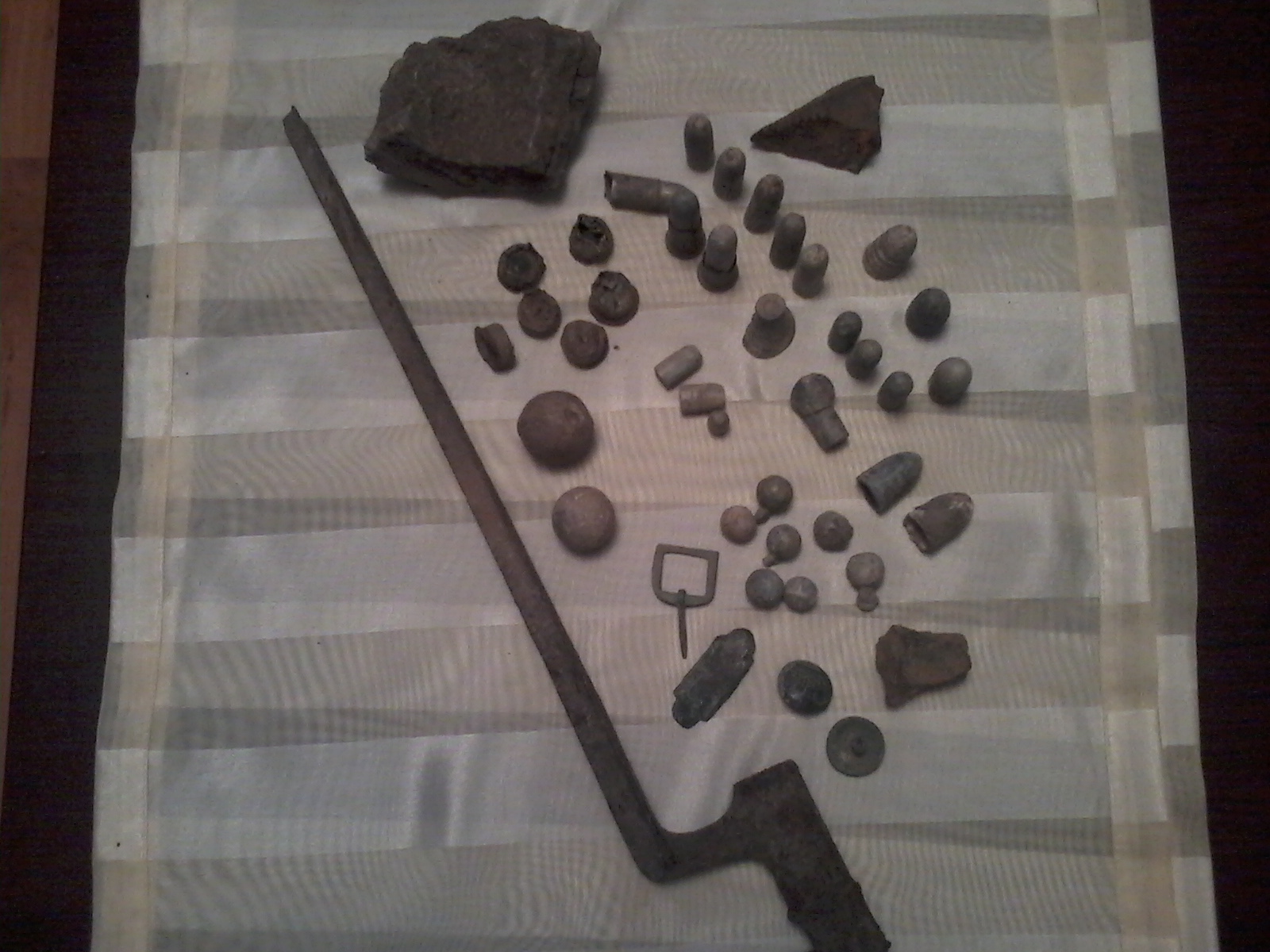 Руски и турски патрони, куршуми, гилзи, шрапнели, копчета и щик от 10 декември 1877г. открити на бойното поле край Долна Митрополия.